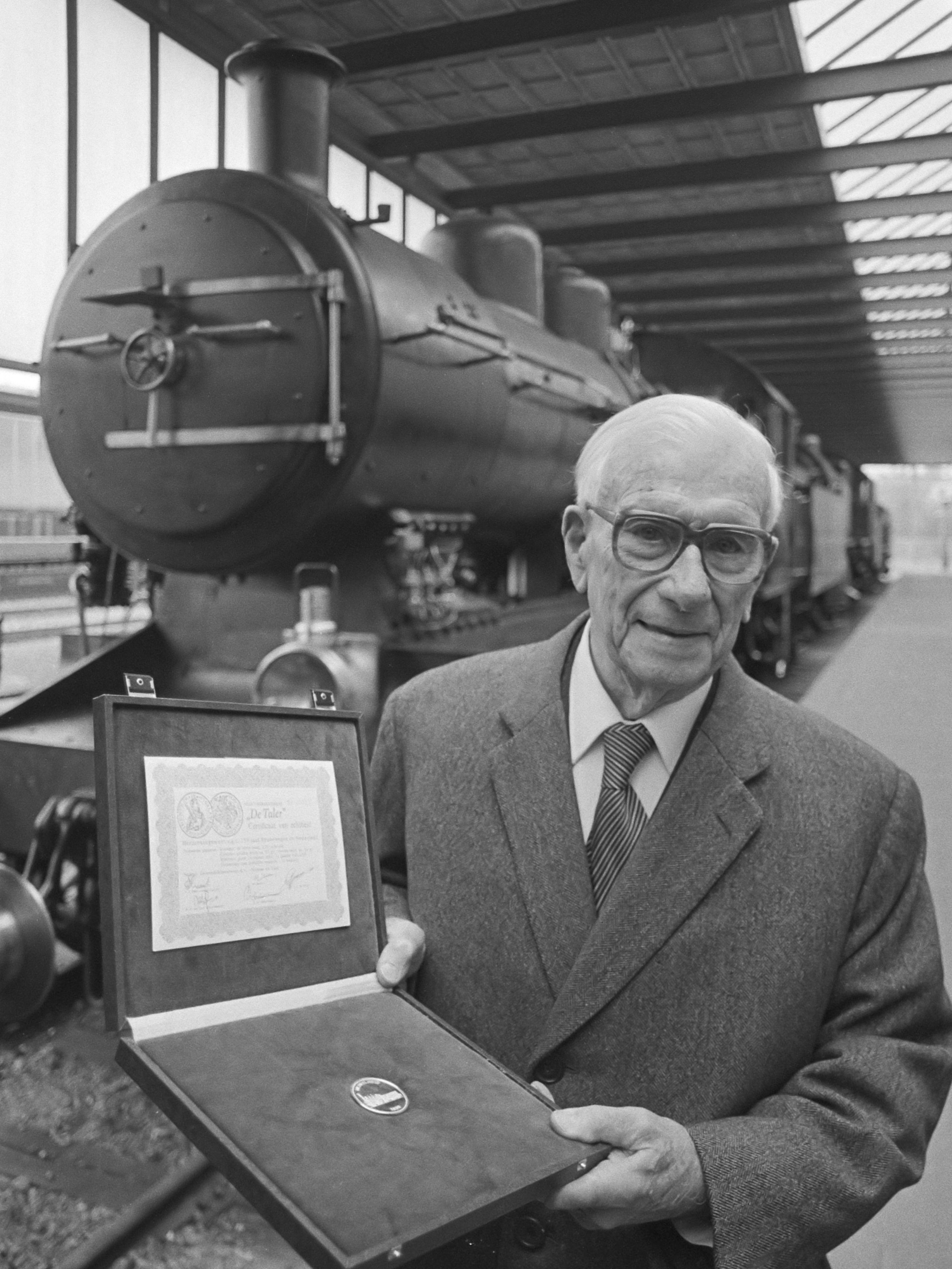 Dr. ir. F. Q. Den Hollander (oud-president NS) (r.) krijgt in het Spoorwegmuseum in Utrecht 1ste exemplaar serie US-herdenkingsmunten door E. M. Meupelerberg 15 februari 1982